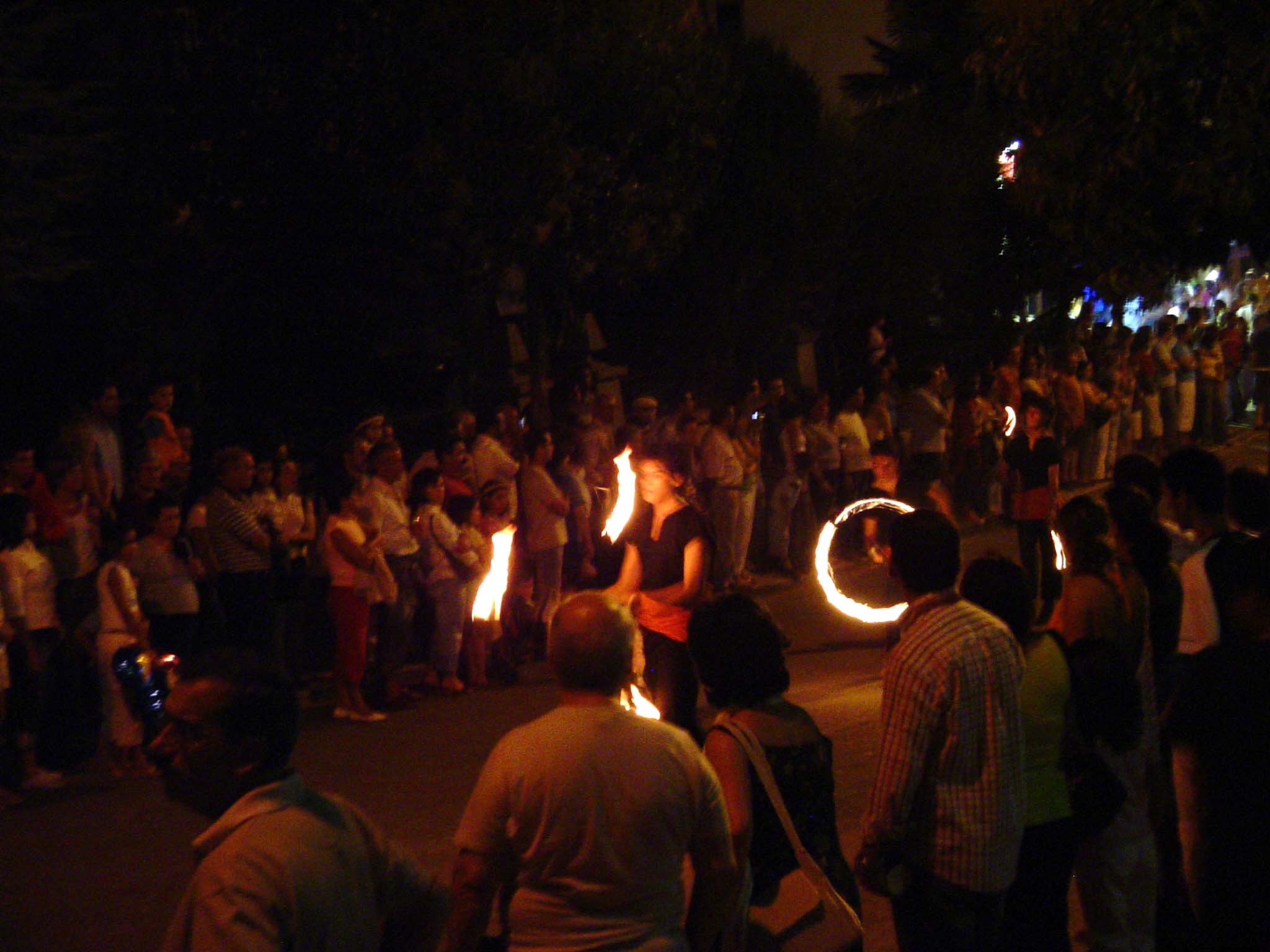 Parade at Viagem Medieval, an annual medieval festival in Santa Maria da Feira - Portugal